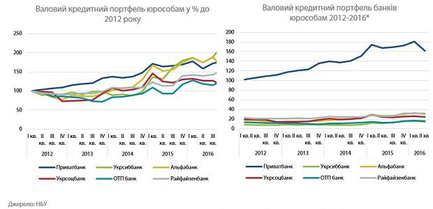 Валовий кредитний портфель юрособам у % до 2012 року та Валовий кредитний портфель банків юрособам протягом 2012-2016рр.